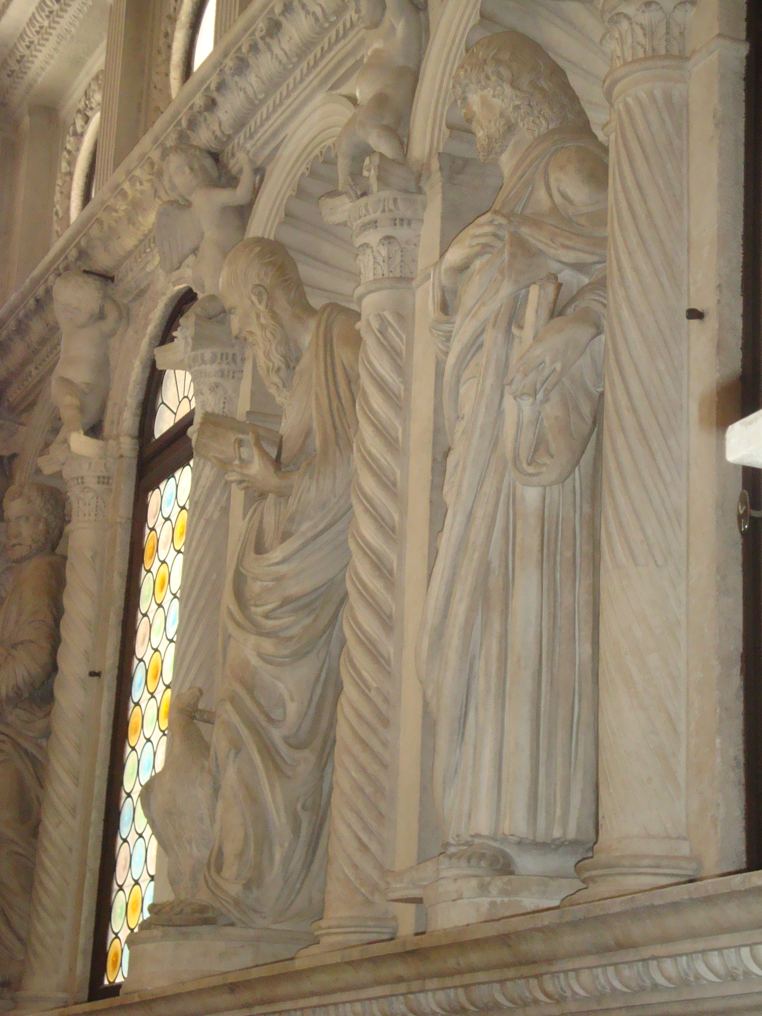 Détail de la Chapelle Jean de Trogir à la cathédrale Saint-Laurent de Trogir.